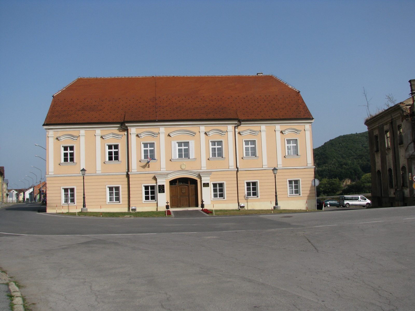 Vijećnica u Hrvatskoj Kostajnici